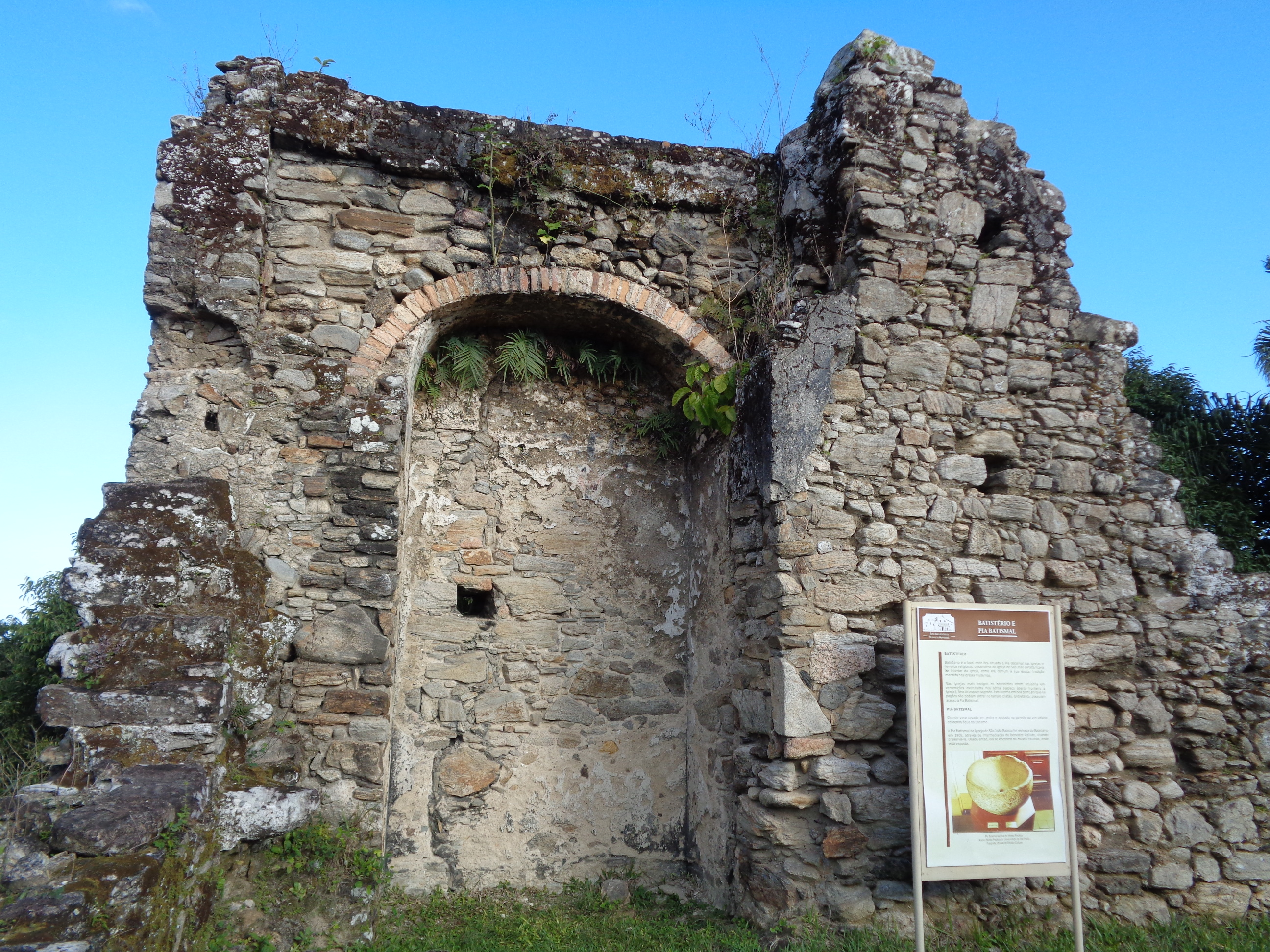 Ruínas do Abarebebê - Peruíbe - SP